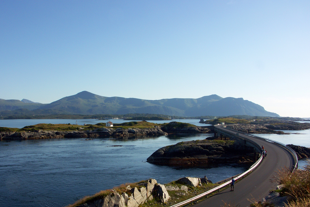 Atlanterhavsvegen